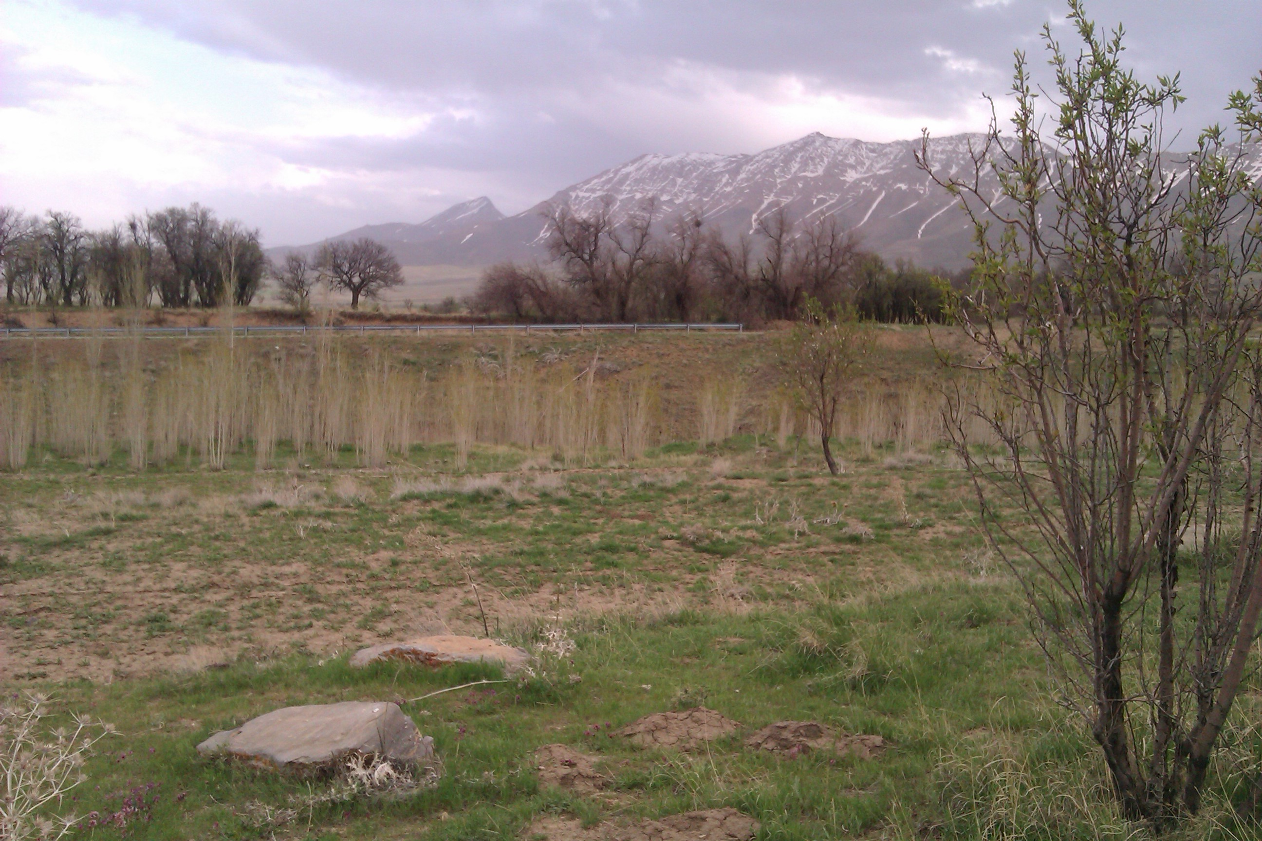 این سنگ نوشته ها مربوط به ساکنین قدیم روستای فرج آباد (ارامنه) میباشد که سالها پیش از این منطقه مهاجرت نموده و برخی از انان ساکن مجیدیه تهران می باشن